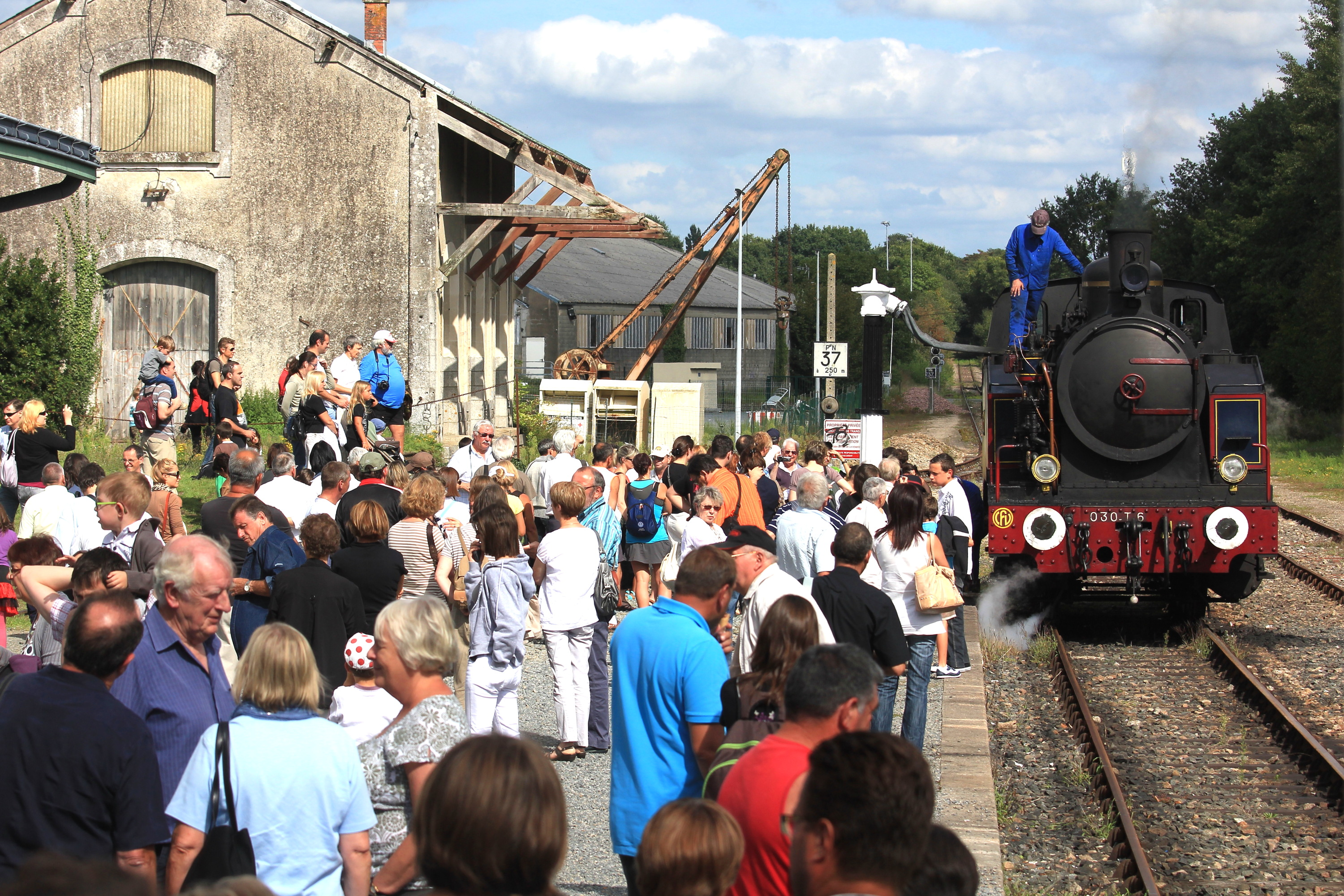 Affluence lors du demi-tour du train touristique à vapeur du chemin de fer de la Vendée, en gare des Herbiers.